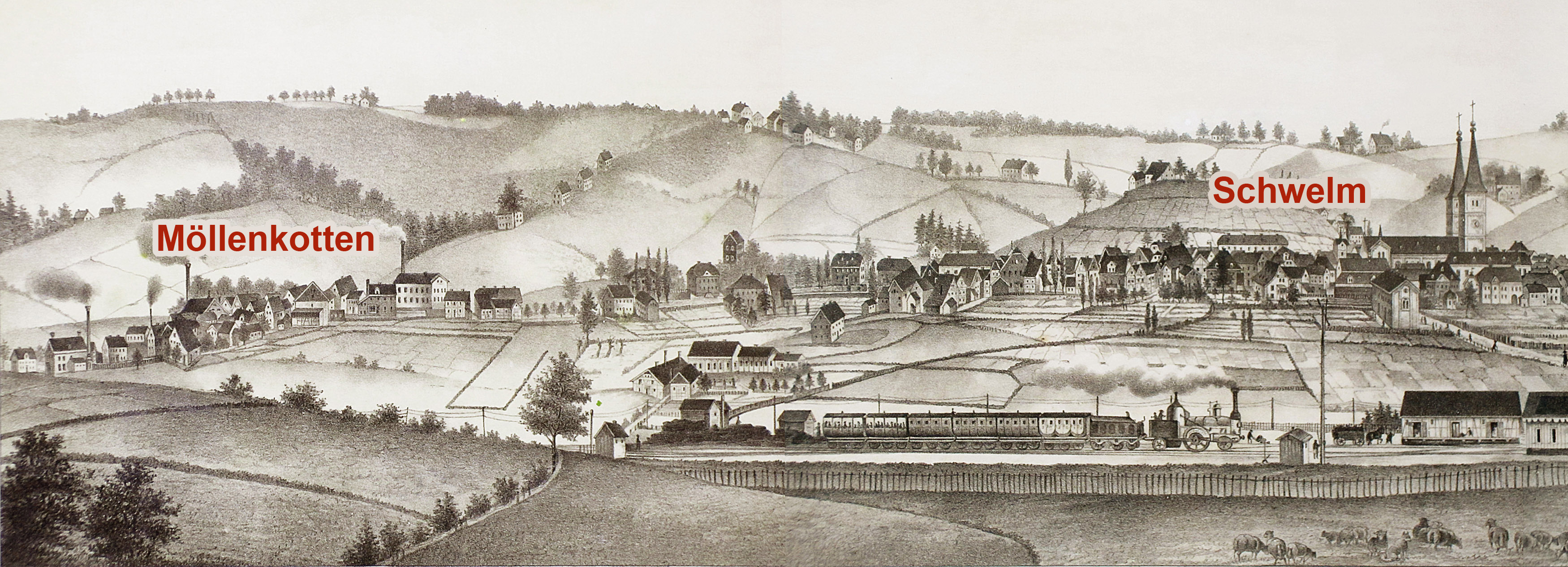 Ansicht von Schwelm und Möllenkotten, von Norden gesehen, 1861. Ausschnitt. Farbiger Text wurde ergänzt.